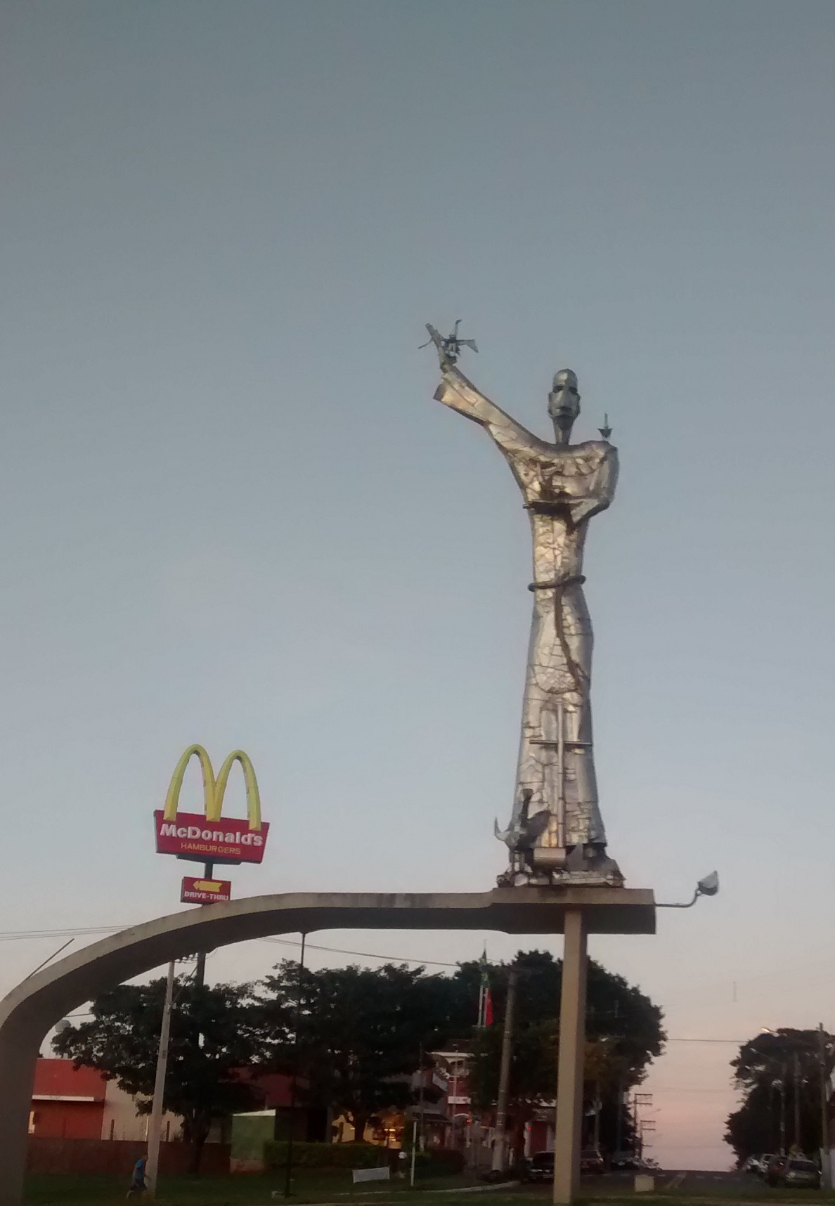 Monumento em homenagem ao Capitão Assis no alto da Avenida Rui Barbosa